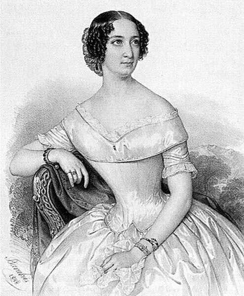 Forrás: Barabás Miklós: Jókainé Laborfalvi Róza (1848)